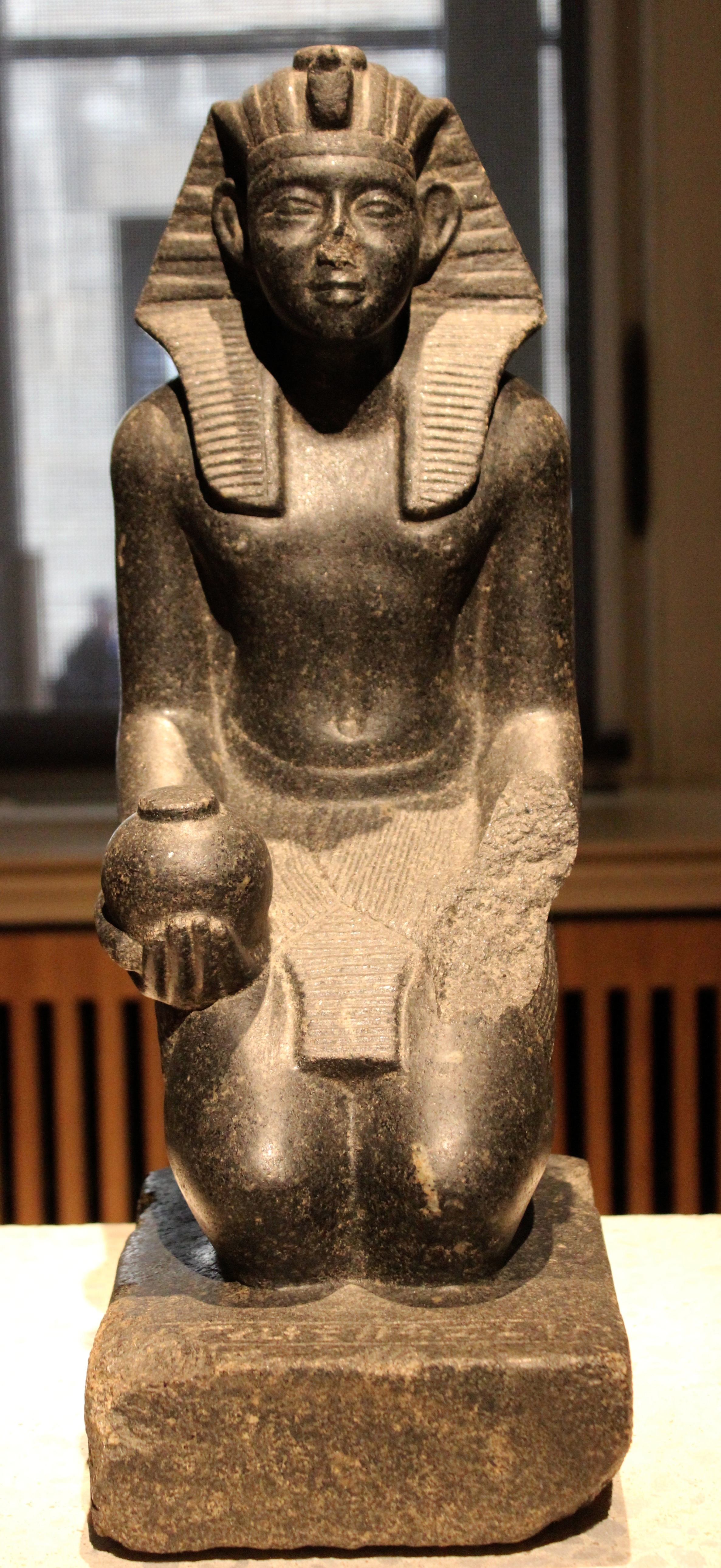 Berlín, Neues Museum. Estatua de Sobekhotep Khahotepre.